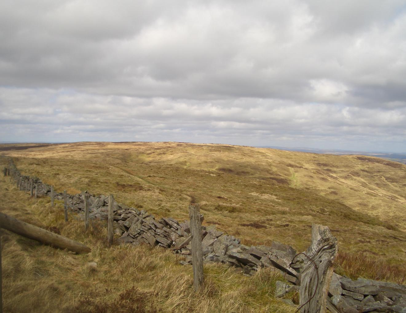 fan frynych